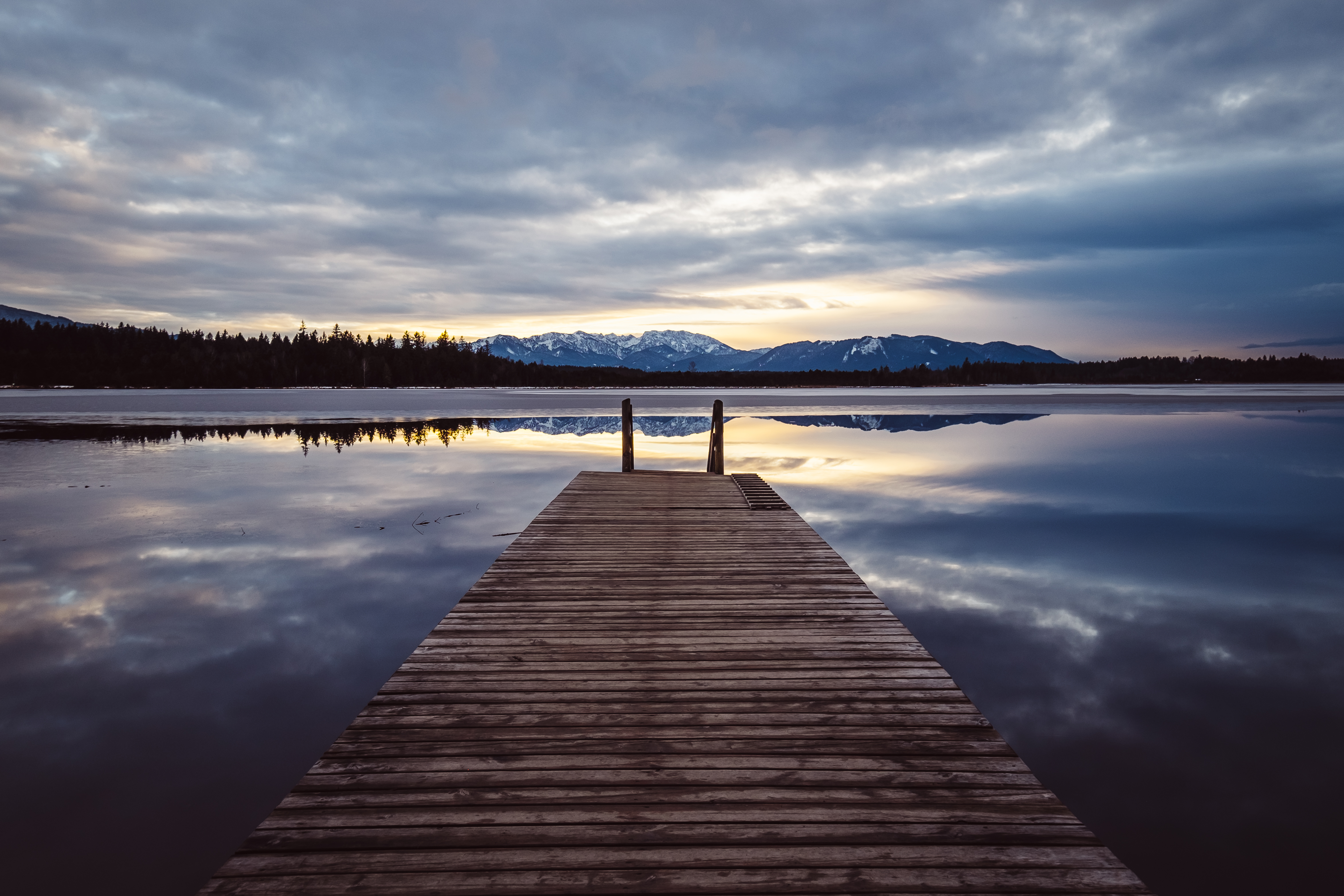 Zu sehen ist der Kirchsee (Oberbayern) im Naturschutzgebiet Ellbach- und Kirchseemoor. Aufgenommen an einem kalten Januarabend, während schon langsam die Sonne hinter den Bergen verschwindet. Eingereicht für WLE2016 in der Kategorie "Wikipedia:Wiki Loves Earth/DE/Listen/BY/Landkreis Bad Tölz-Wolfratshausen" mit der Kennung: NSG-00030.01 und WDPA: 4416 Titel: Kirchsee in der Abendsonne Art: Naturschutzgebiet als auch ein FFH-Gebiet Nummer: NSG-00030.01 WDPA: 4416 Gehört zu: Ellbach- und Kirchseemoor Lage: oberbayerischen Landkreis Bad Tölz-Wolfratshausen und dem Landkreis Miesbach Ort: Kirchsee (Oberbayern)